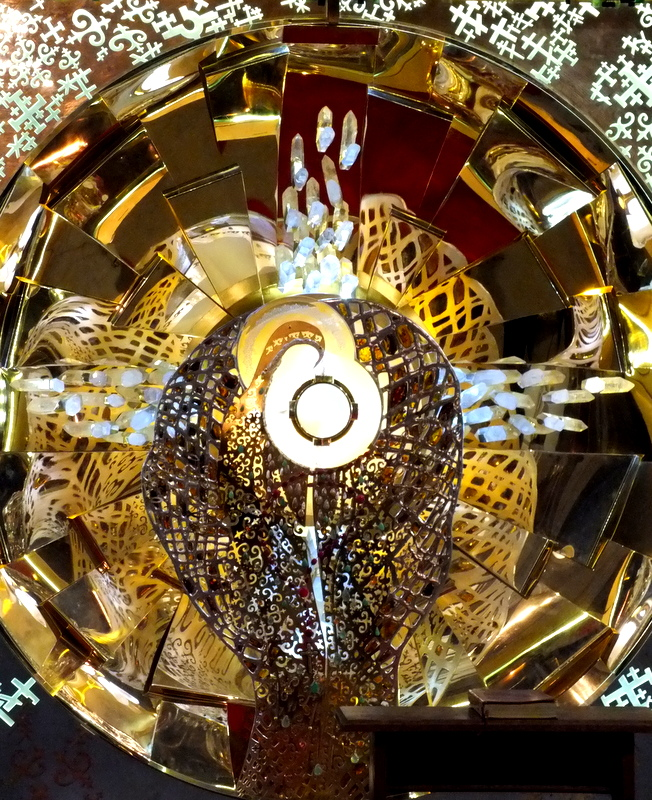 „Gwiazda Kazachstanu”, ołtarz-tabernakulum. Dzieło autorstwa Mariusza Drapikowskiego, pobłogosławione w Rzymie 10 października 2012 r. przez Benedykta XVI, peregrynowało po Polsce. Ołtarz zawitał m.in. do Gdańska, na Jasną Górę, do Krzeszowa, Wałbrzycha, Wrocławia, Oleśnicy, Lubonia, nawiedził także katedrę na warszawskiej Pradze, aby na początku czerwca 2013 r. trafić do miejsca swojego przeznaczenia, do sanktuarium Matki Bożej Królowej Pokoju w niewielkim Oziornoje w Kazachstanie.